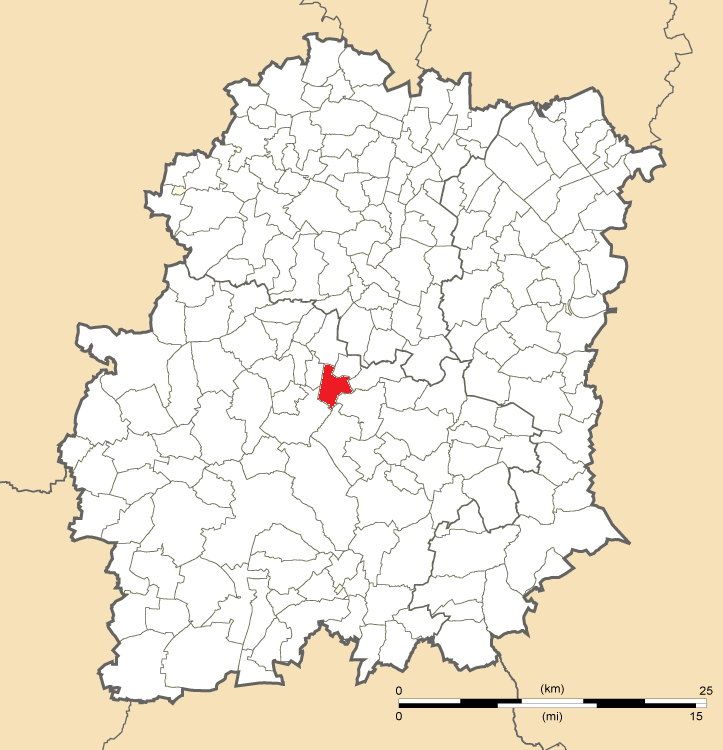 Carte de position de Chamarande en Essonne (91)